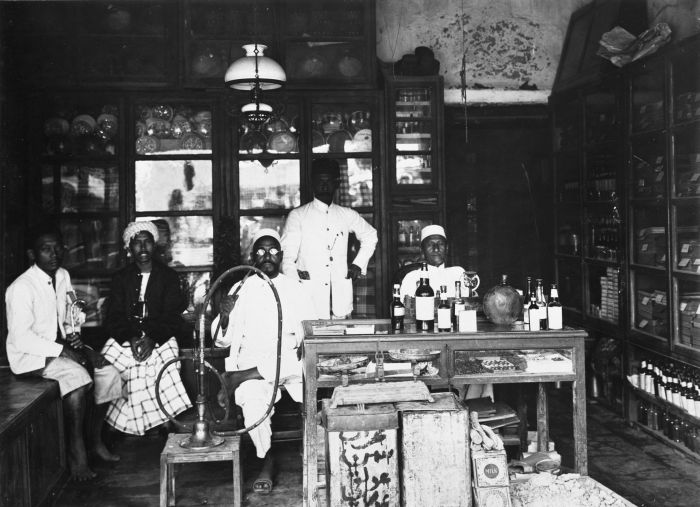 Foto. Een Arabische winkel op Java